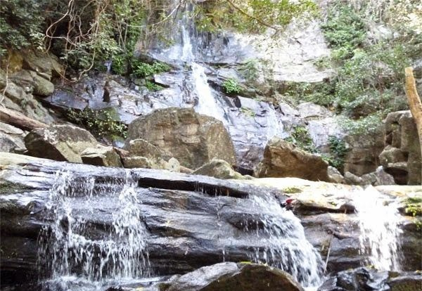 Thác nước